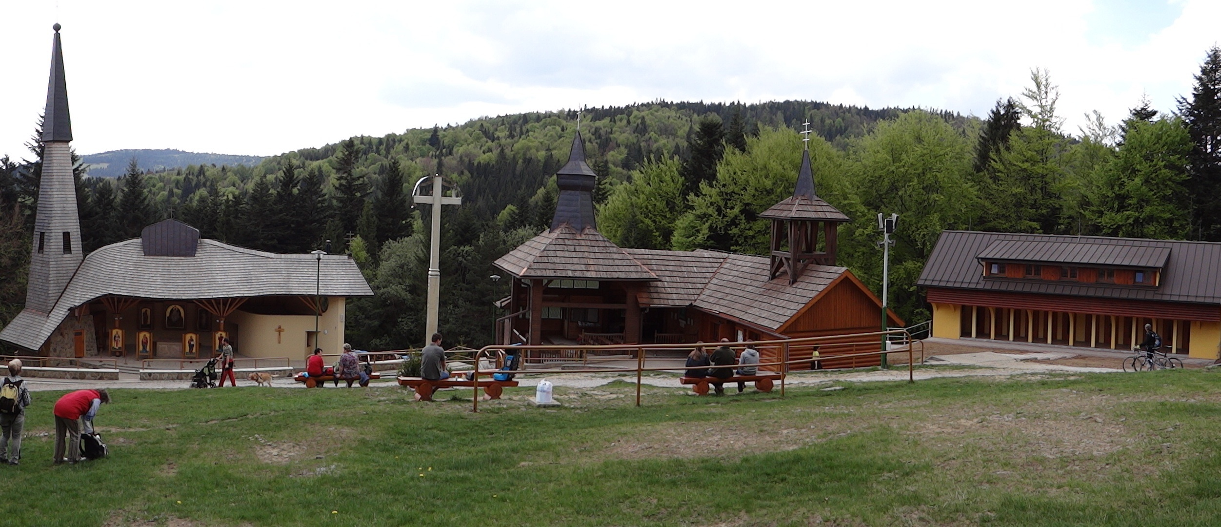 Sanktuarium Matki Boskiej Litmanowskiej na polanie Zvir na eliaszówce